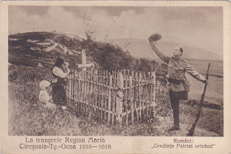 La mormântul unui erou pe dealul Cireșoaia.